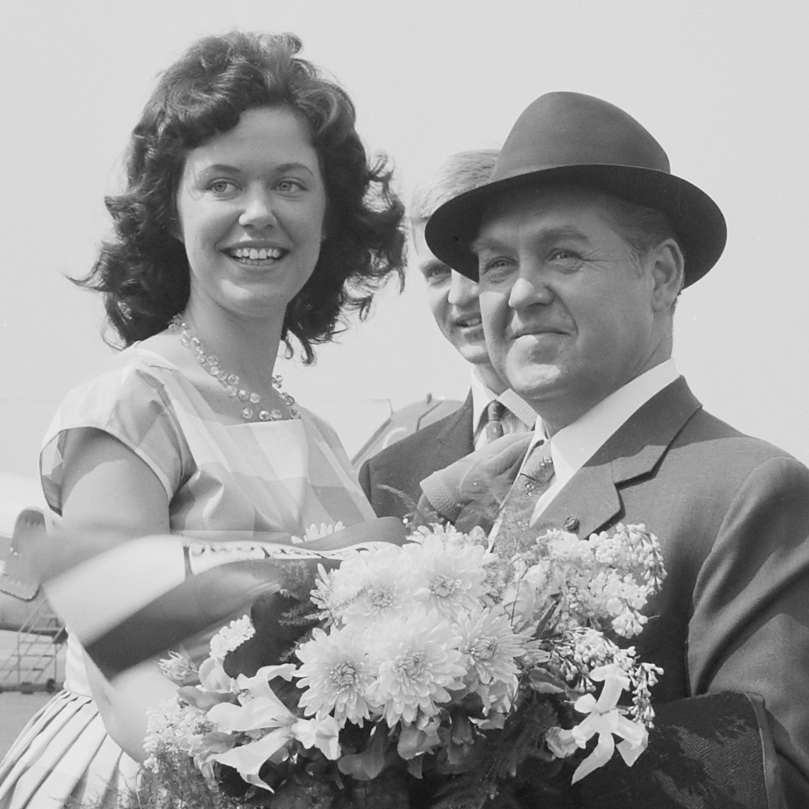 Aankomst Jussi Bjorling op Schiphol met zoon, de alt Nora de Wit van het Amsterdams Operakoor biedt bloemen aan 6 mei 1960